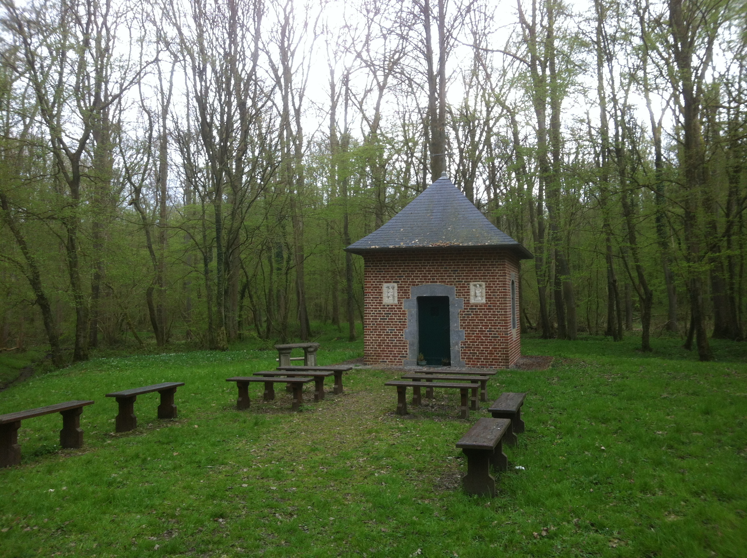 Chapelle Notre Dame de Bon Secours - Bois-l'Évêque (forêt) - Commune d'Ors - Département du Nord